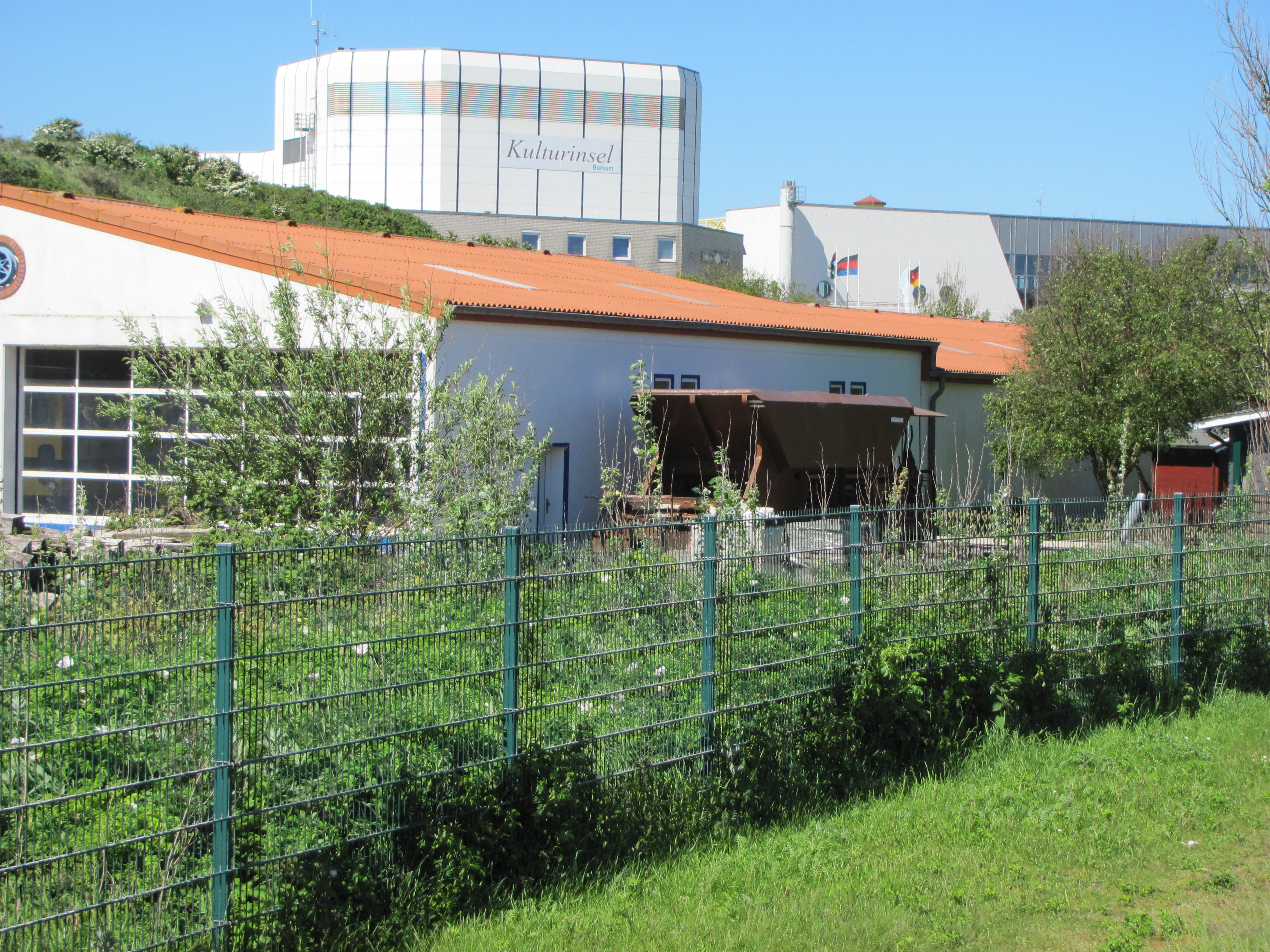 Trichterwagen für Kohletransport der Borkumer Kleinbahn, ex: Kerkerbachbahn